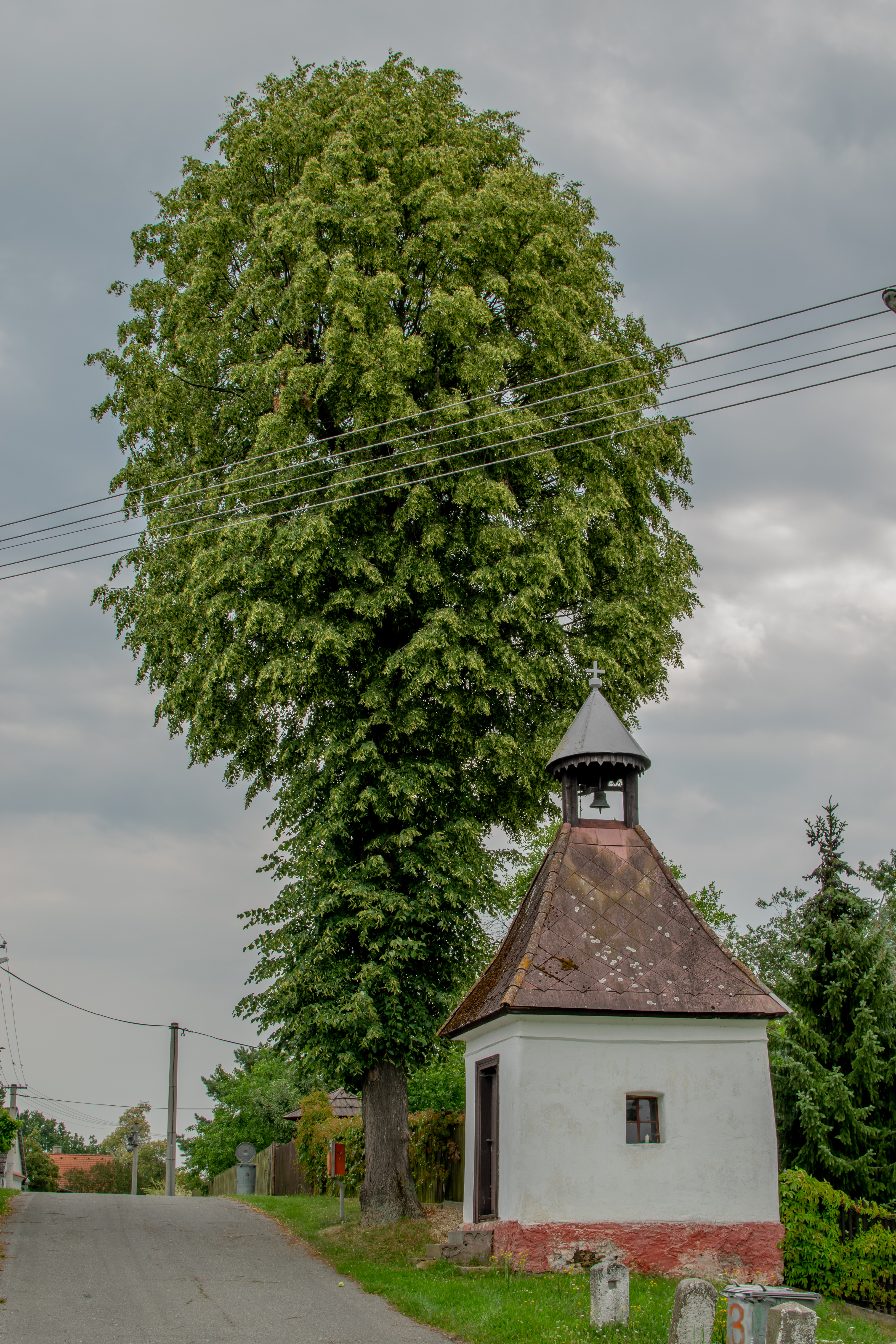 Podolí